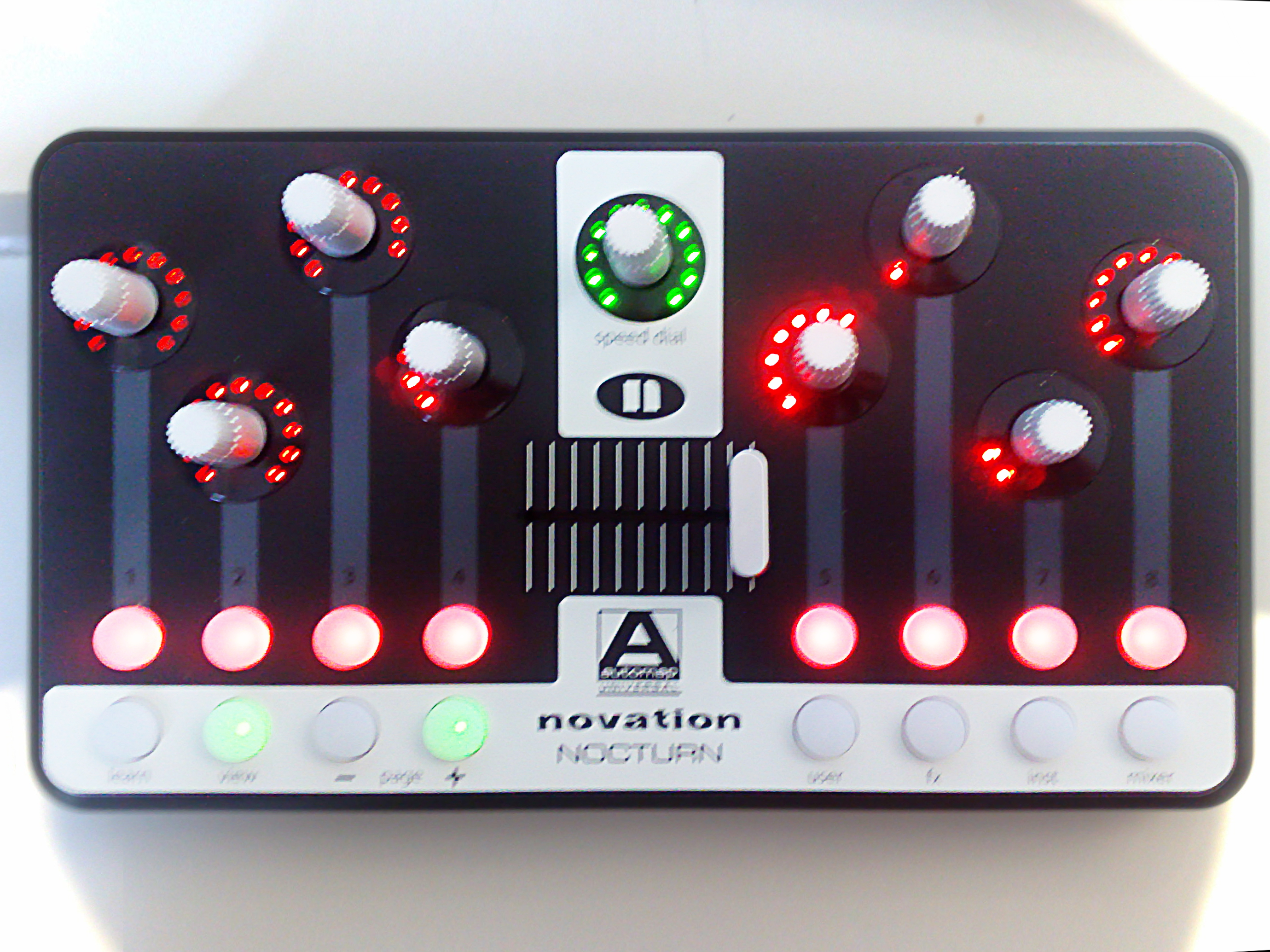 novation NOCTURN Blinkenlights